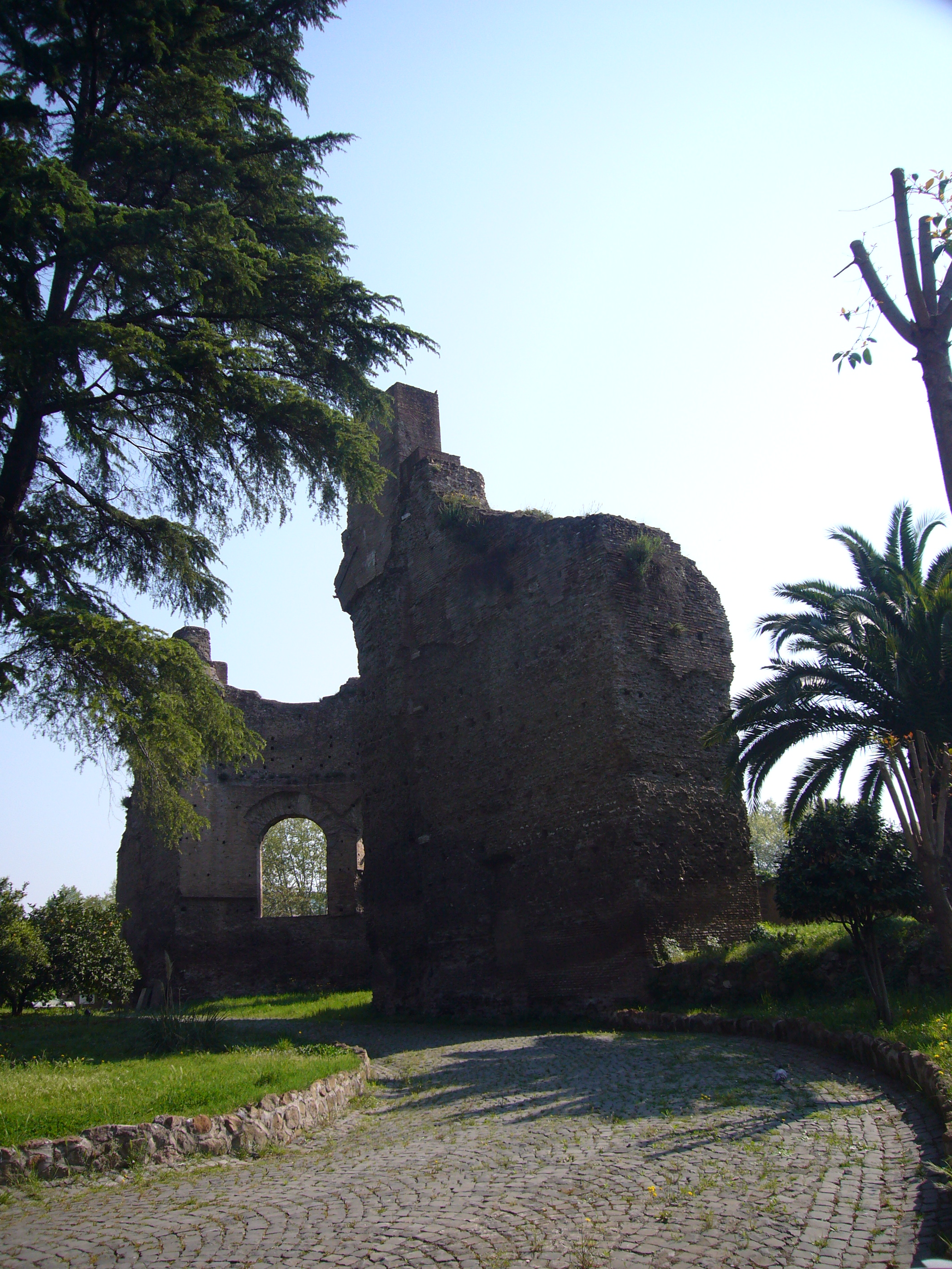 Roma, Santa Croce in Gerusalemme: resti del Sessorium